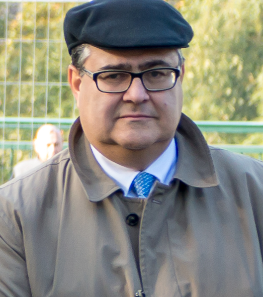 D'Journée de la commémoration nationale erënnert un d'Lutte vum Lëtzebuerger Vollek géint d'Nazi-Okkupatioun am Zweete Weltkrich. D'Commemoratioun ass am Oktober, um Sonnden deen am notse beim 10. Oktober läit. Se erënnert domat un den Echec vun der Personenstandsaufnahme vum 10. Oktober 1941. Feierlechkeete ginn a ville Gemengen ofgehal, an der Stad Lëtzebuerg sinn et der gläich dräi: Beim Nationalmonument vun der Lëtzebuerger Solidaritéit um Kanounenhiwwel, bei der Gëlle Fra op der Constitutiounsplaz a beim Hinzerter Kräiz um Nikloskierfecht. Um Kanounenhiwwel huet de Grand-duc den 9. Oktober 2016 e Kranz néierleeë gelooss an d'Erënnerungsflam vrum Monument raniméiert. No der Heemecht huet hien zesumme mam Chamberpresident, dem Premier an der Stater Buergermeeschtesch d'Monument besicht. Mat der Begréissung vun de Fändeldréier, de Vertrieder vun de patrioteschen Organisatiounen a vun den Holocaust-Affer, den auslänneschen Ambassadeuren, den Autoritéite vu Staat a Gesellschaft an och de Studente vum Stater Kolléisch an der Universitéit goung d'Zeremonie hei zu Enn. De Procureur général adjoint Jeannot Nies.